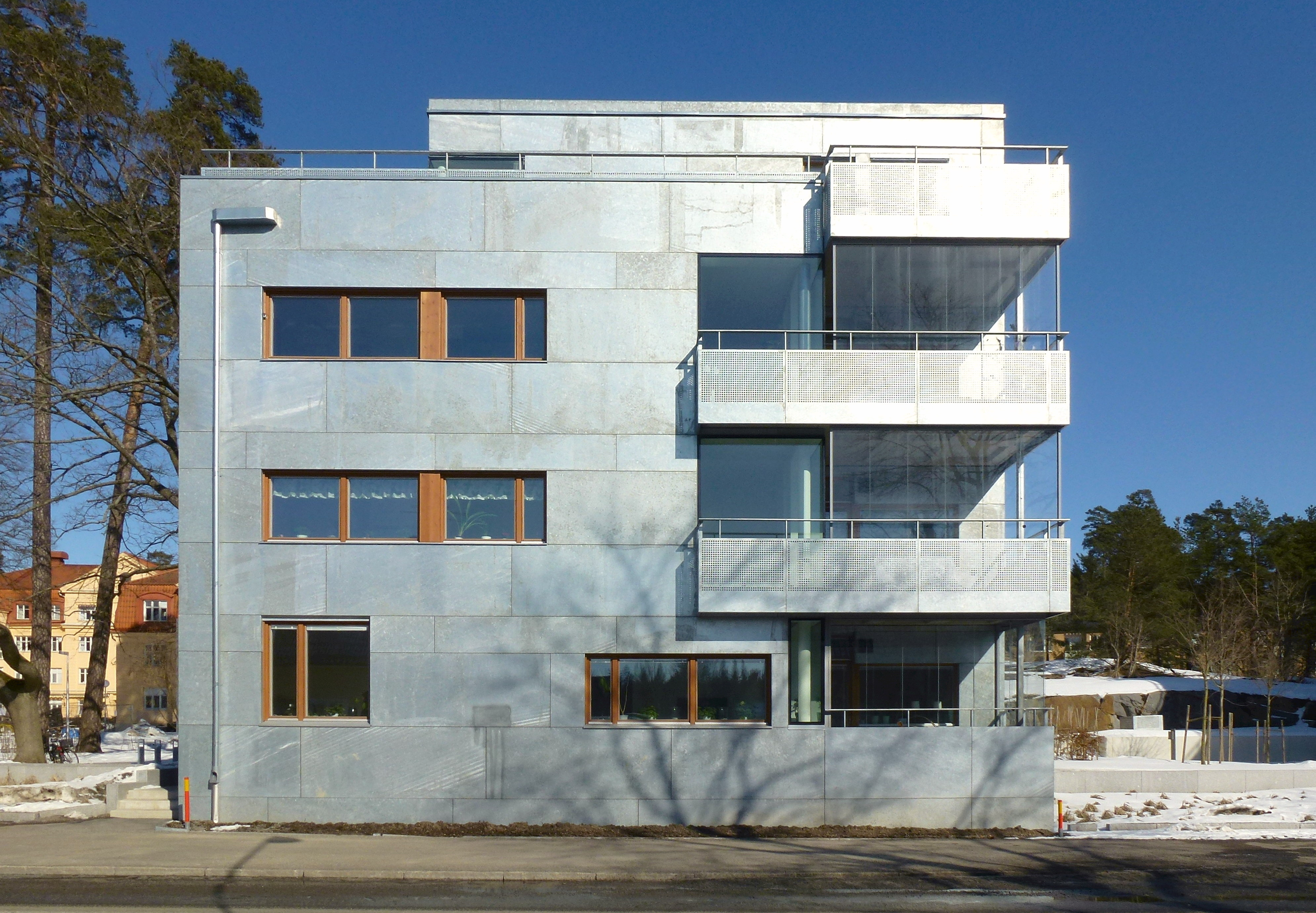 Kvarteret De gamles vänner